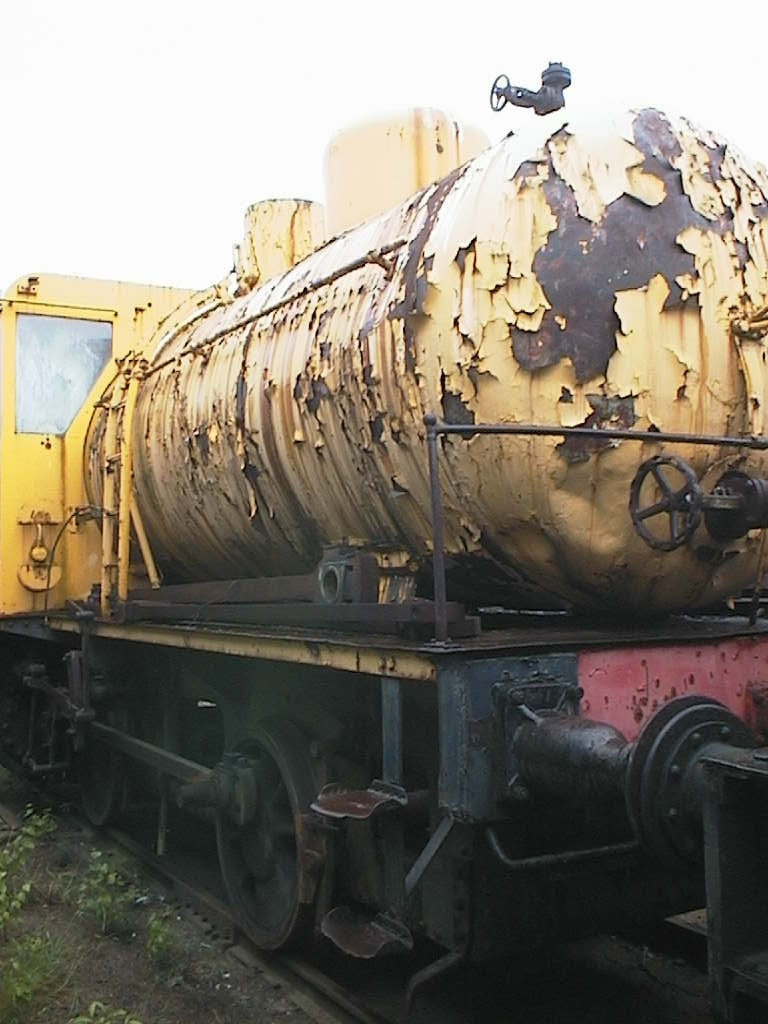 Entinen Oulu Oy:n Henschel-höyrysäiliöveturi